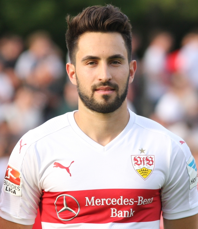 Lukas Rupp beim Auftakttraining Saison 2015/16. Aufgenommen von